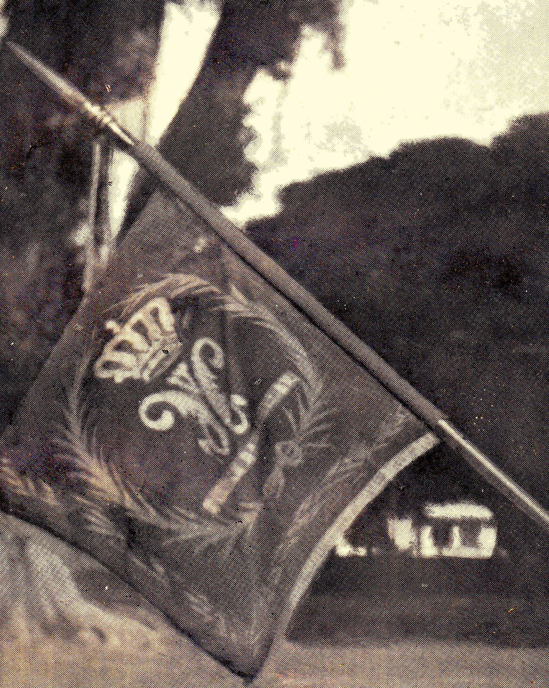 Vaandel van de barisan Korpsen